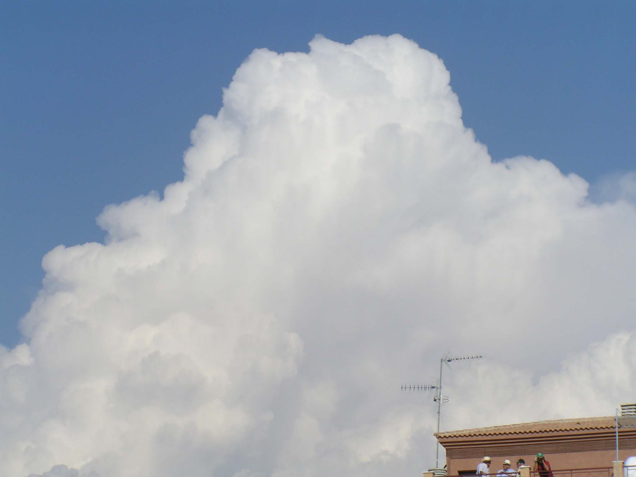 Estremeñu: Cumulunimbu.